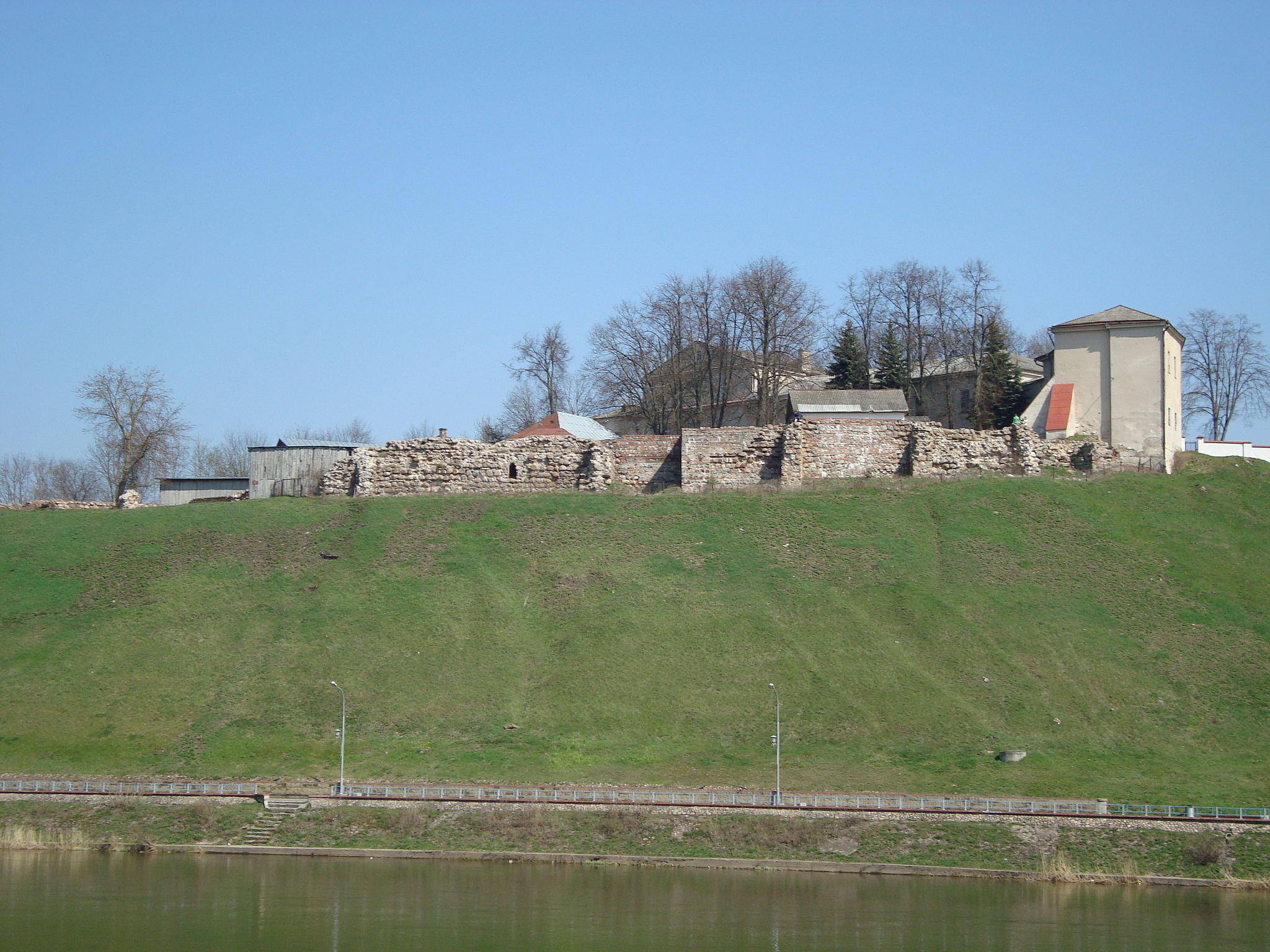 Old Castle in Grodno / Старый замок в Гродно